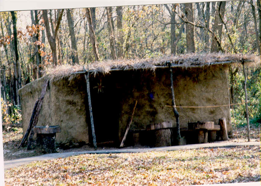 ჩეროკეთა ზაფხულის სახლი